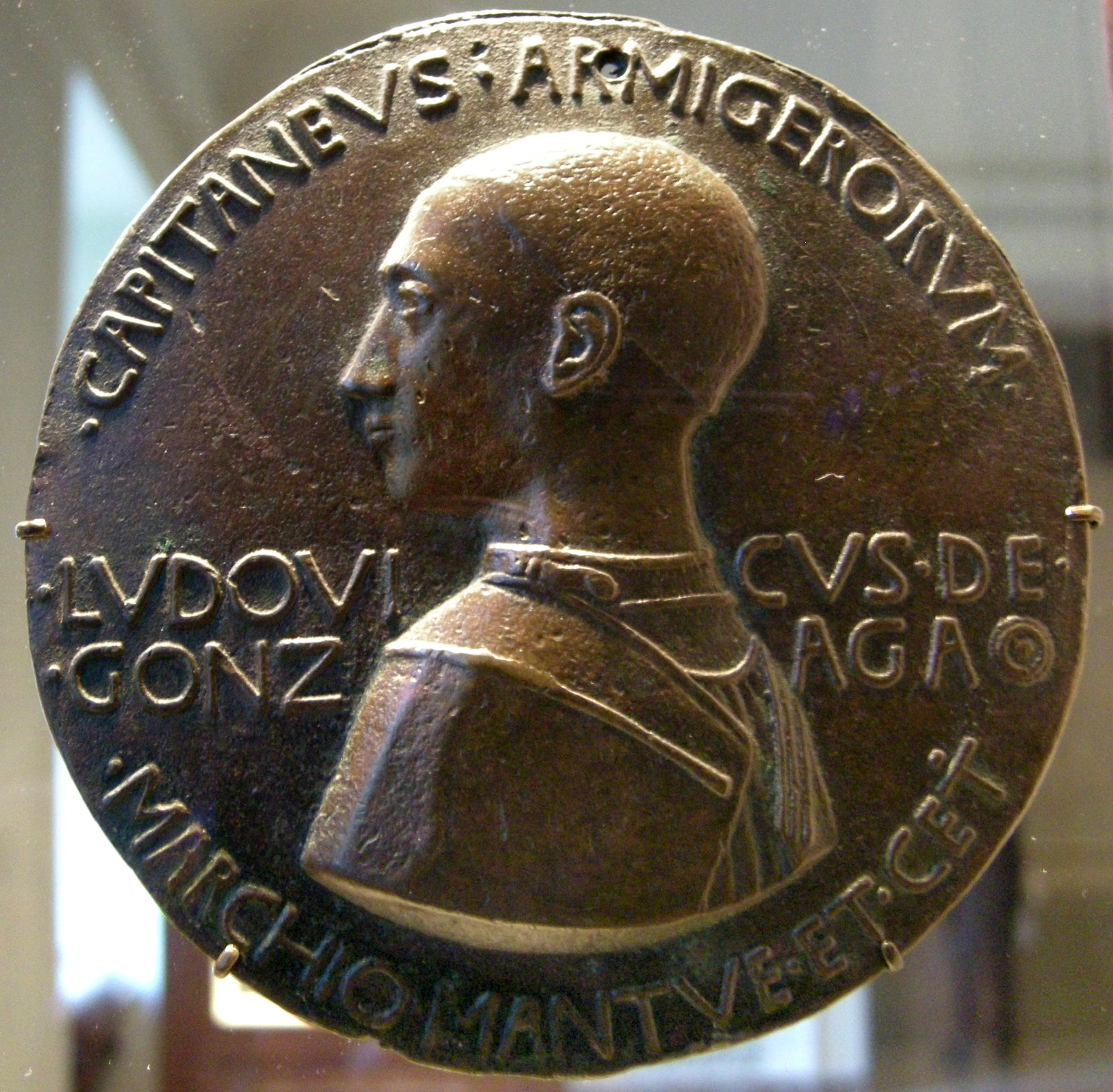 Medaglia di Ludovico III Gonzaga, 1447